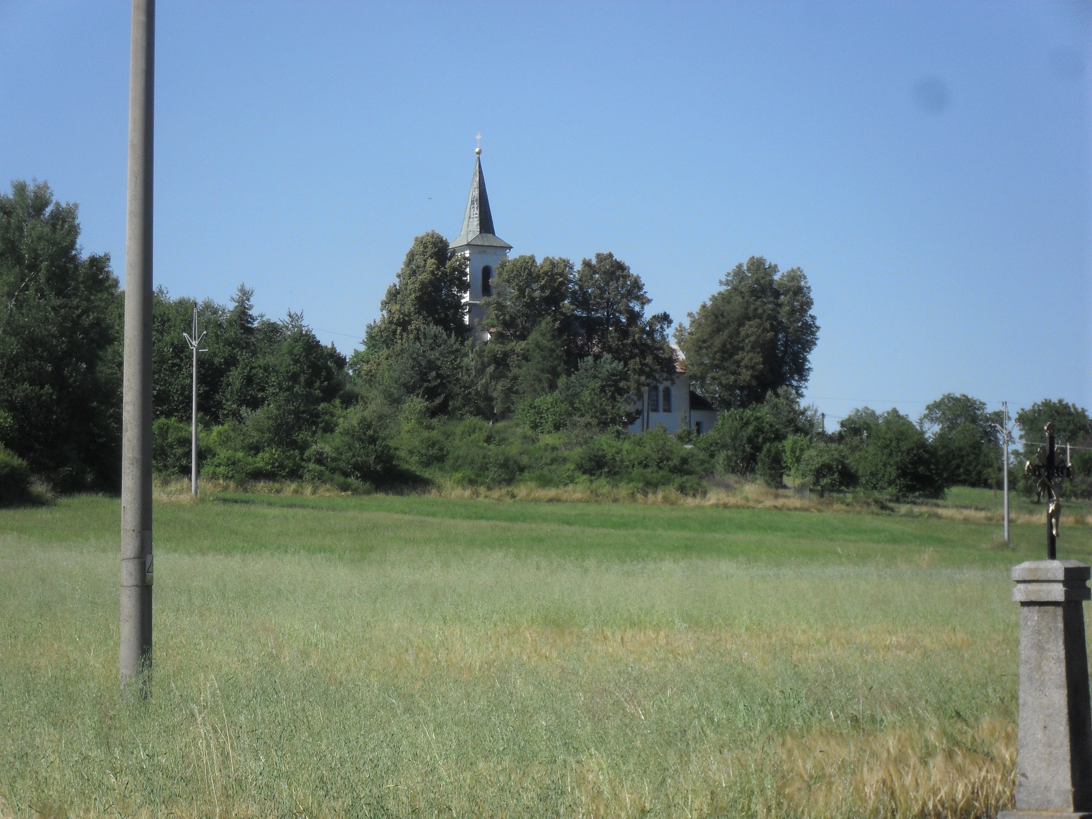 Fotografie Pačejovského kostela, směrem od Velešic.